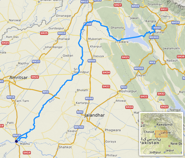 carte réalisée sur umap, This map may be incomplete, and may contain errors. Don't rely solely on it for navigation.